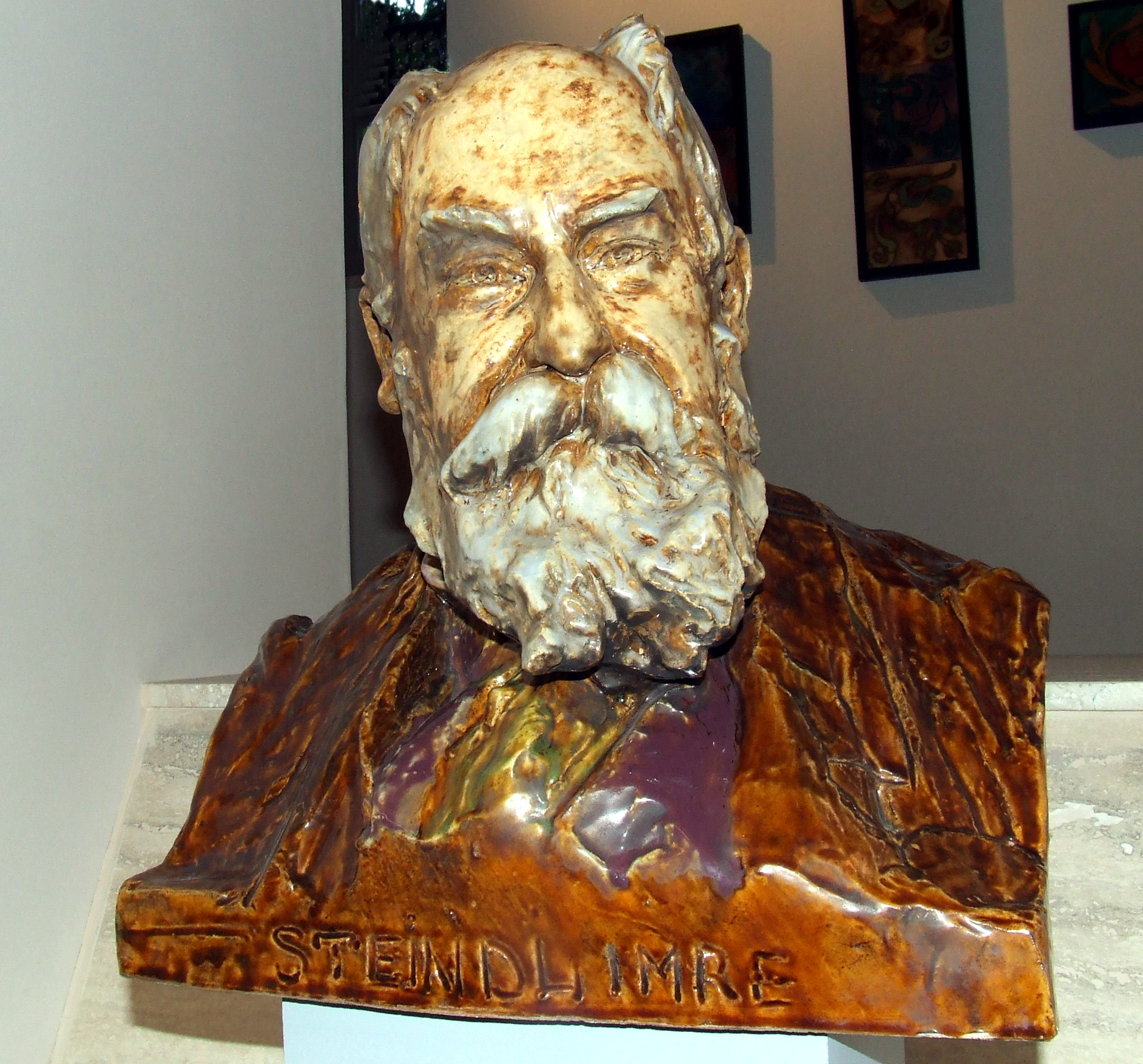 Steindl Imre (1839–1902) építész portrészobra a pécsi Zsolnay Múzeumban. Stróbl Alajos alkotása (1899)